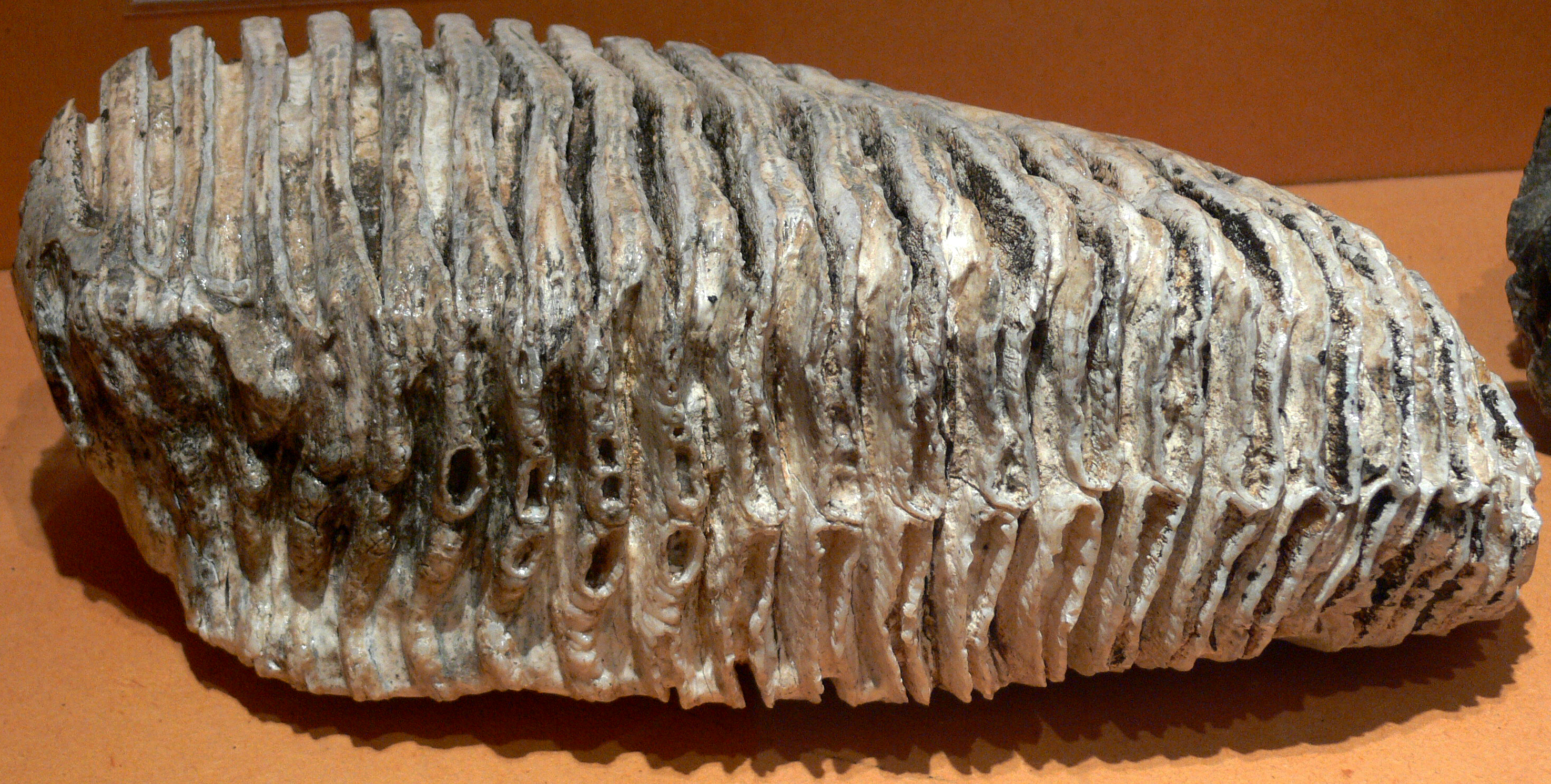 Molaire de mammouth découverte à la font de Champdamoy (Quincey, Haute-Saône). Vesoul, Musée Georges-Garret.